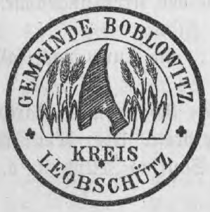 Altes Siegel bzw. Stempel der Gemeinde Boblowitz im Kreis Leobschütz.